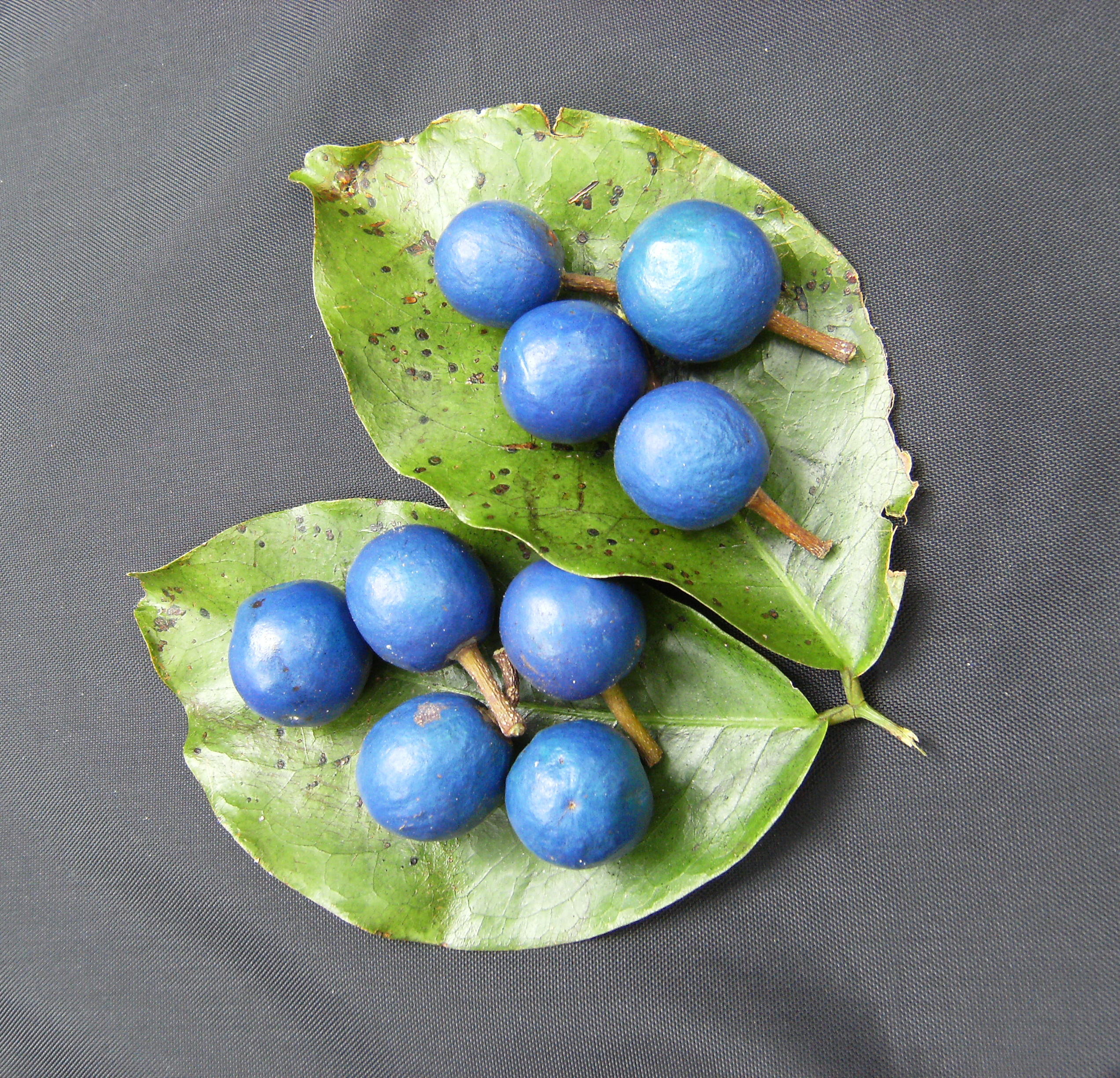 Blaue Früchte (Elaeocarpus angustifolius)